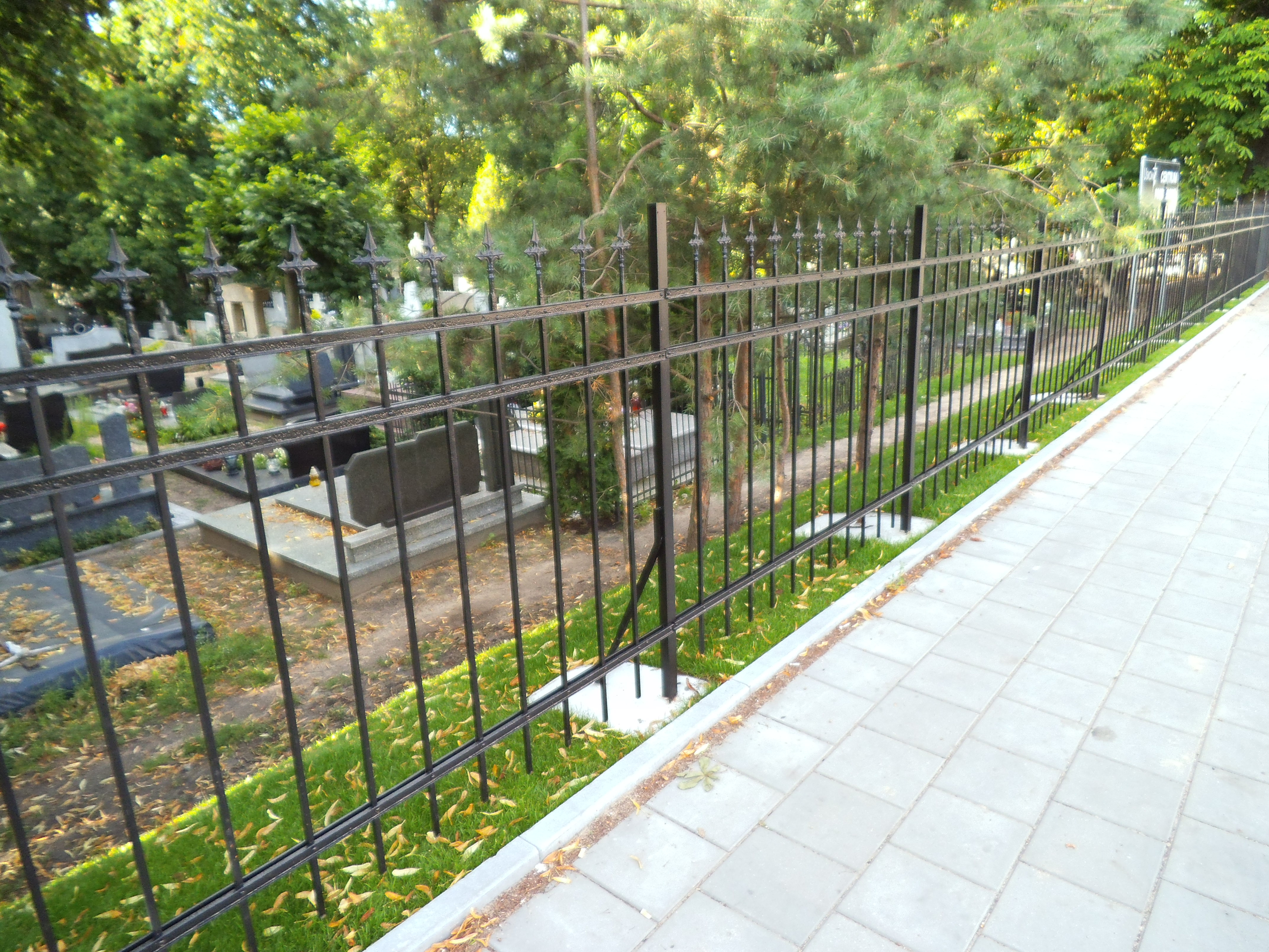 Cmentarz św. Jerzego w Toruniu